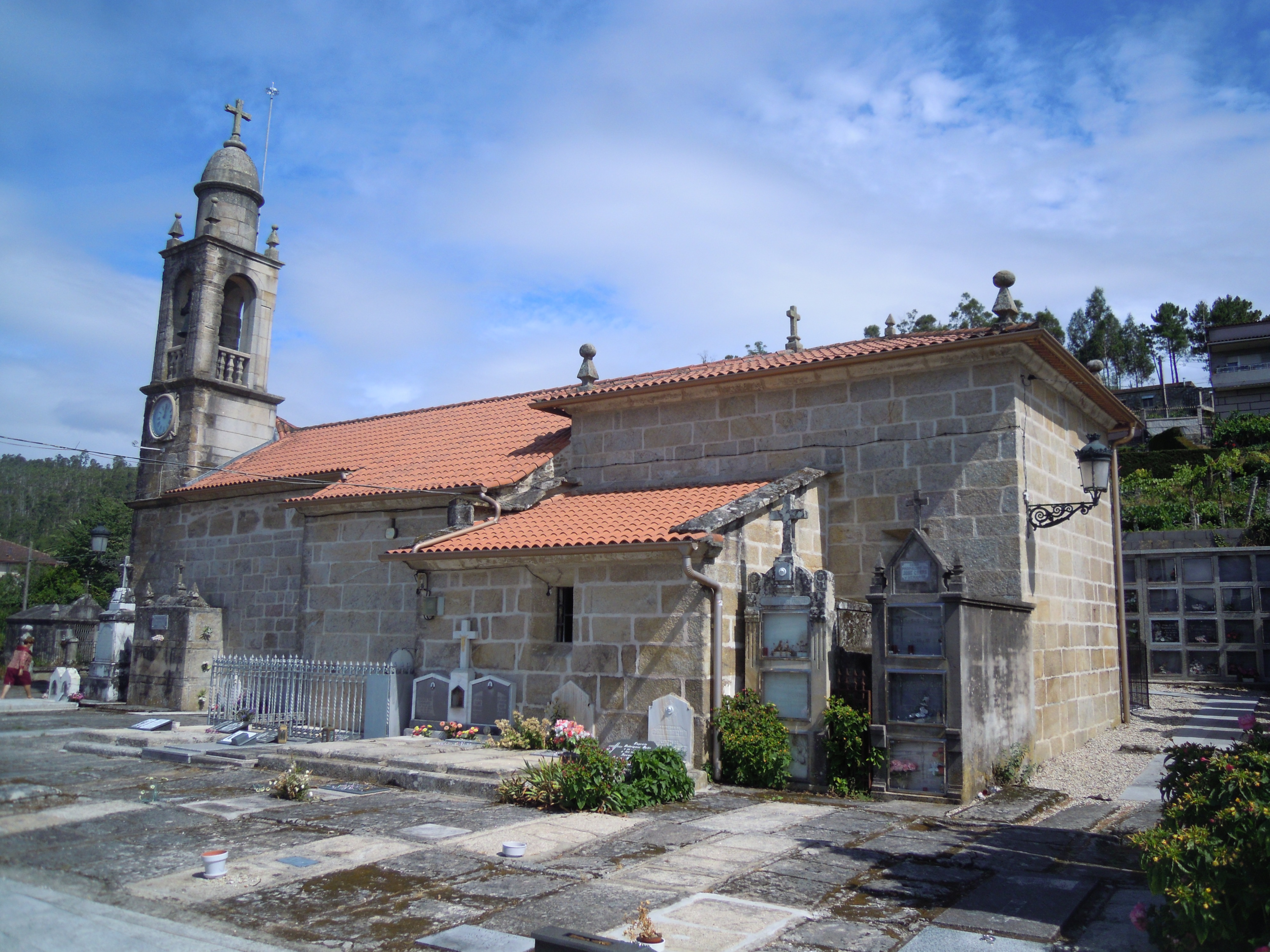 Igrexa de Santa María de Sela (Arbo)